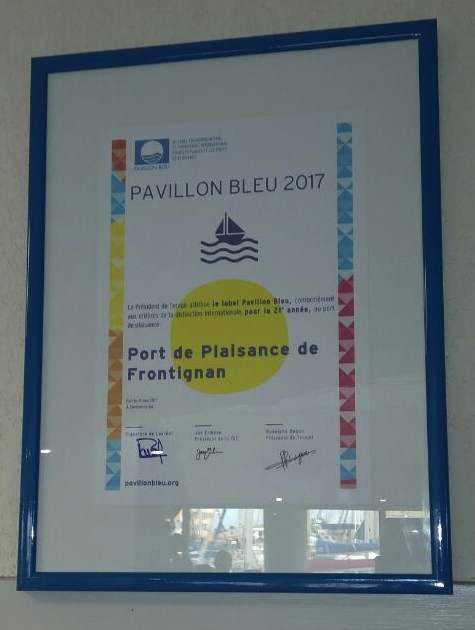 Diplôme du label Pavillon Bleu 2017